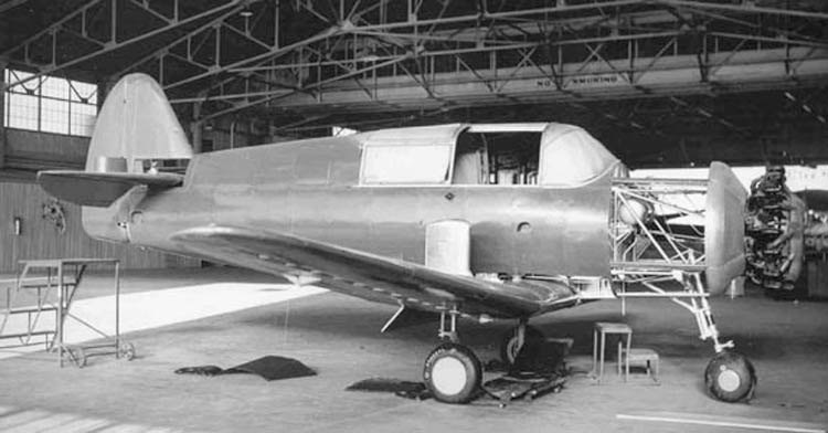 BoeingSchoolT6